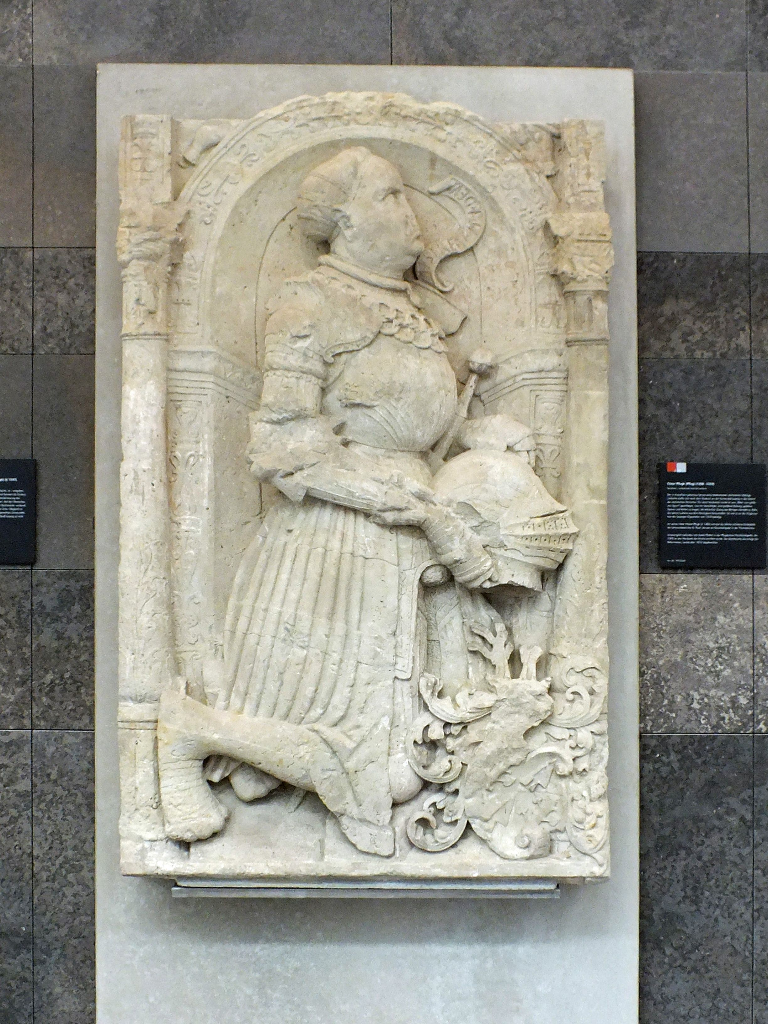 Grabplatte des Cäsar Pflugk. Ehemals in der Universitätskirche St. Pauli, jetzt im Neuen Augusteum der Universität Leipzig